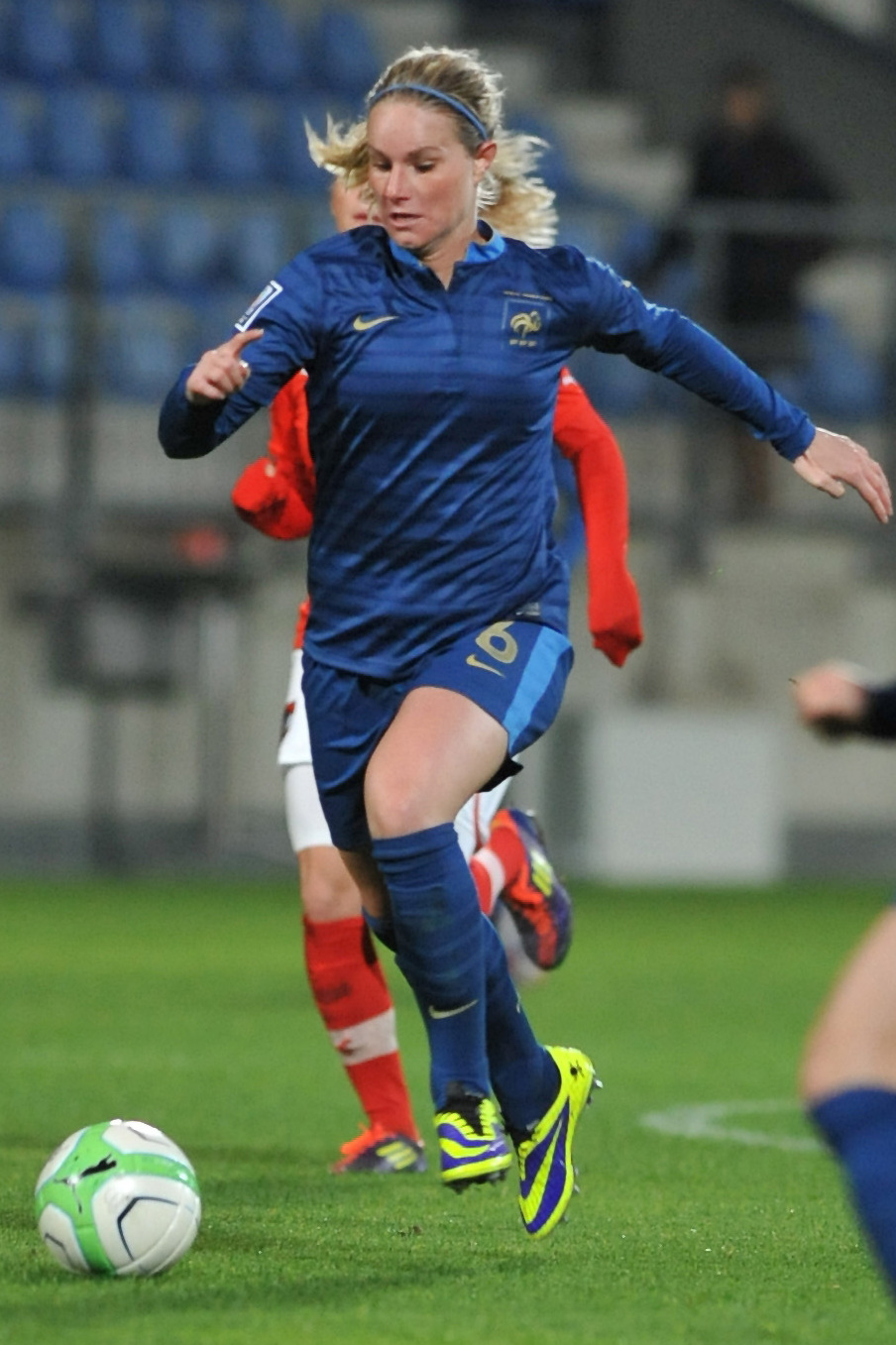 FIFA Women's World Cup 2015 Qualiying Round Österreich - Frankreich am 31. Oktober 2013 in Ritzing: Amandine Henry